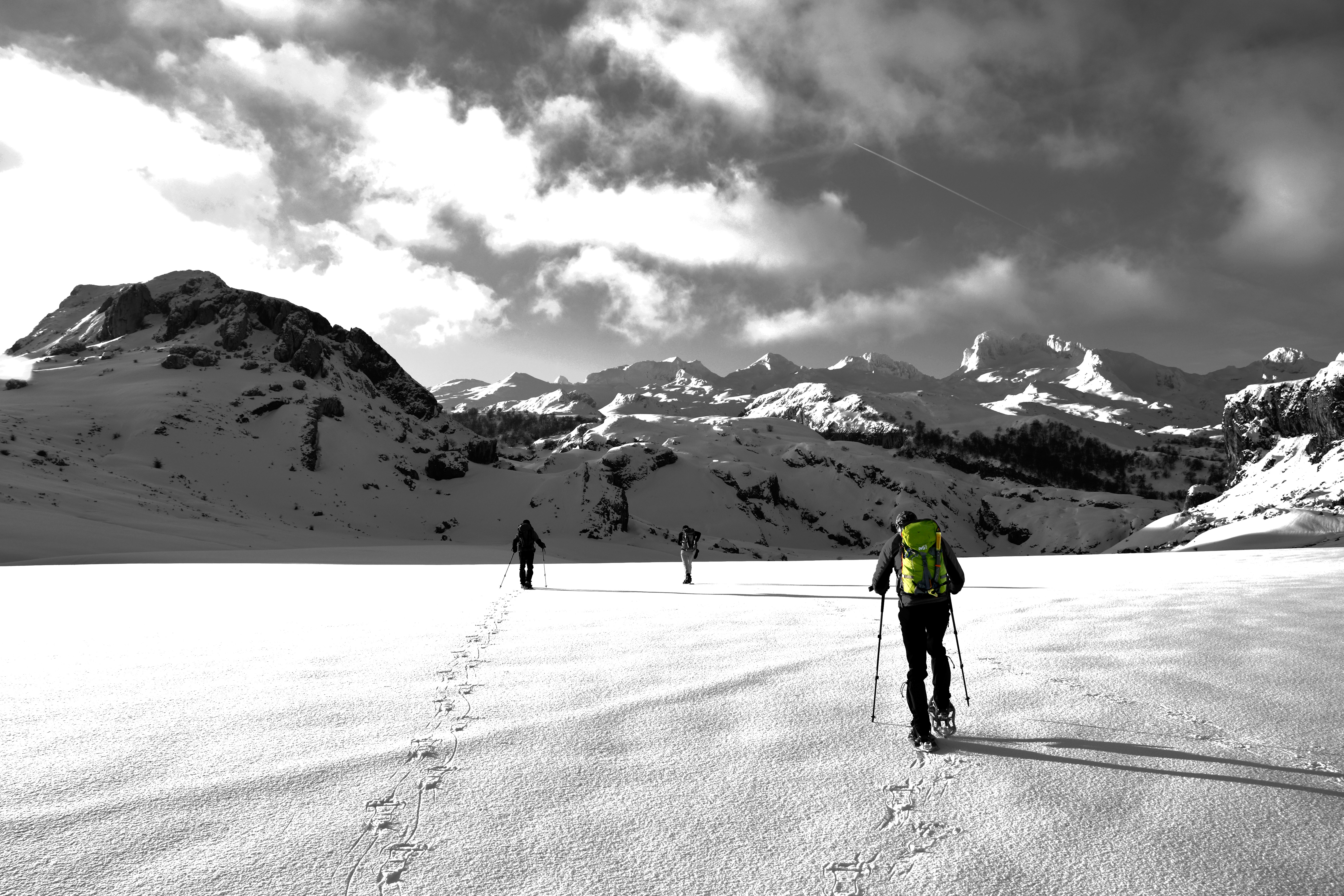 Ruta en raquetas de nieve en el marco de los Picos de Europa en la zona de los Lagos. This is a photography of a Site of Community Importance in Spain with the ID: ES1200001. Natura2000 entry, EEA entry